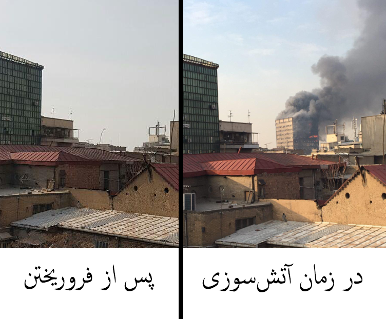 مقایسه قبل و بعد از فروریختن ساختمان پلاسکو